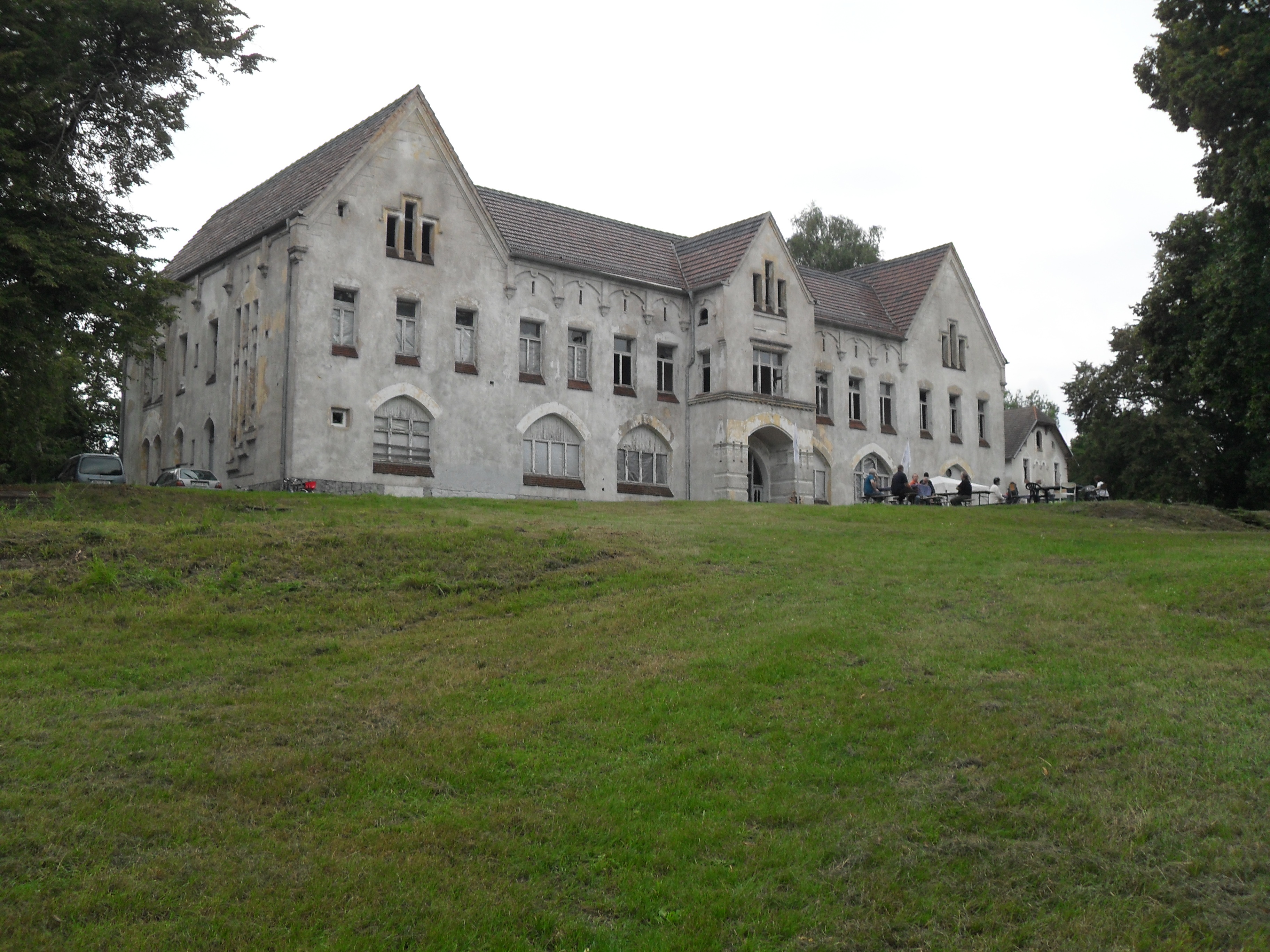 Die Mecklenburg-Strelitz'sche Landesirrenanstalt Domjüch wurde ab 1934 als Heil- und Pflegeanstalt Domjüch bezeichnet. Die Ruinen der Anstaltsgebäude liegen am Ufer des Domjüchsees im Neustrelitzer Stadtteil Strelitz-Alt und stehen unter Denkmalschutz.